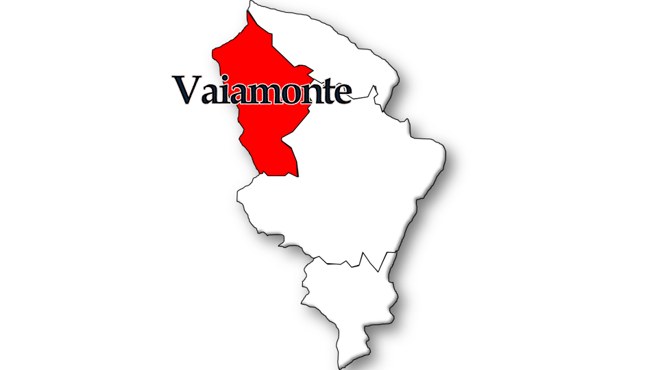 Evolução da População